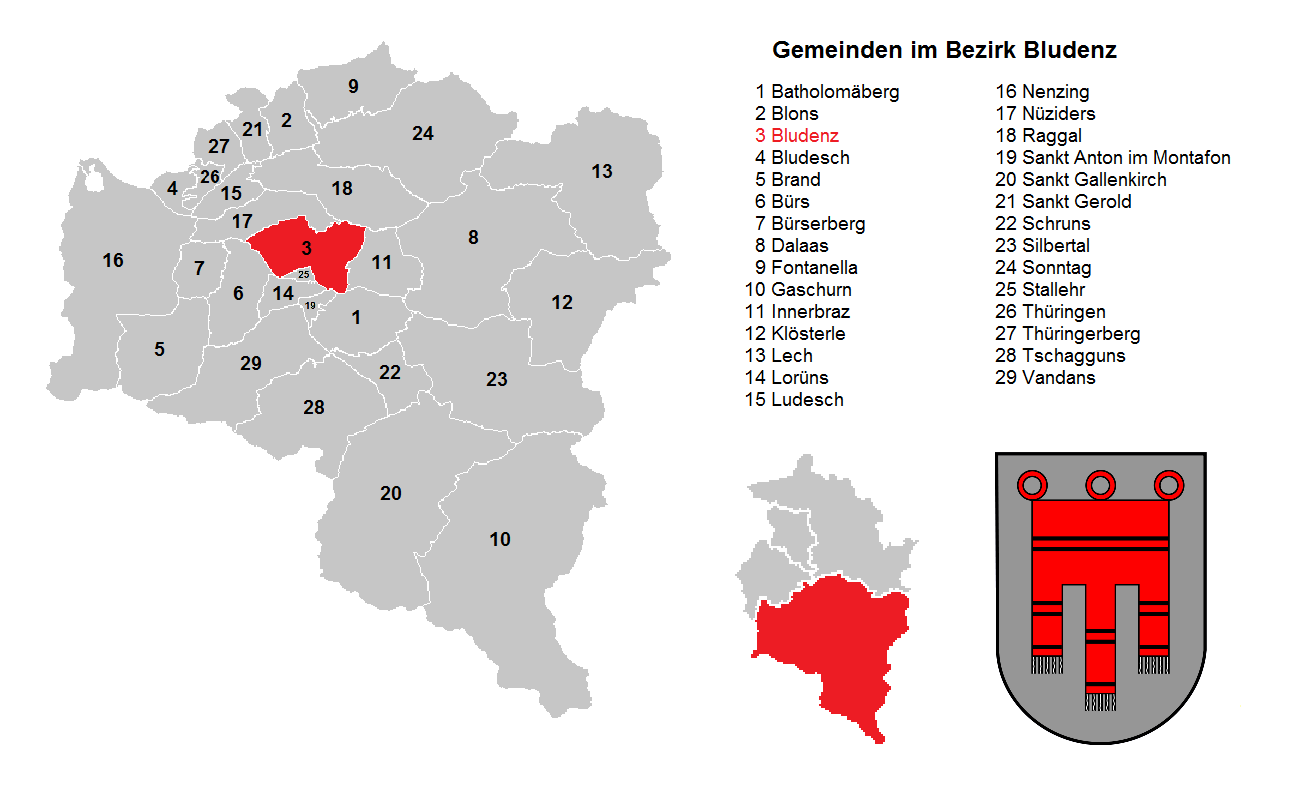 Bezirk Feldkirch